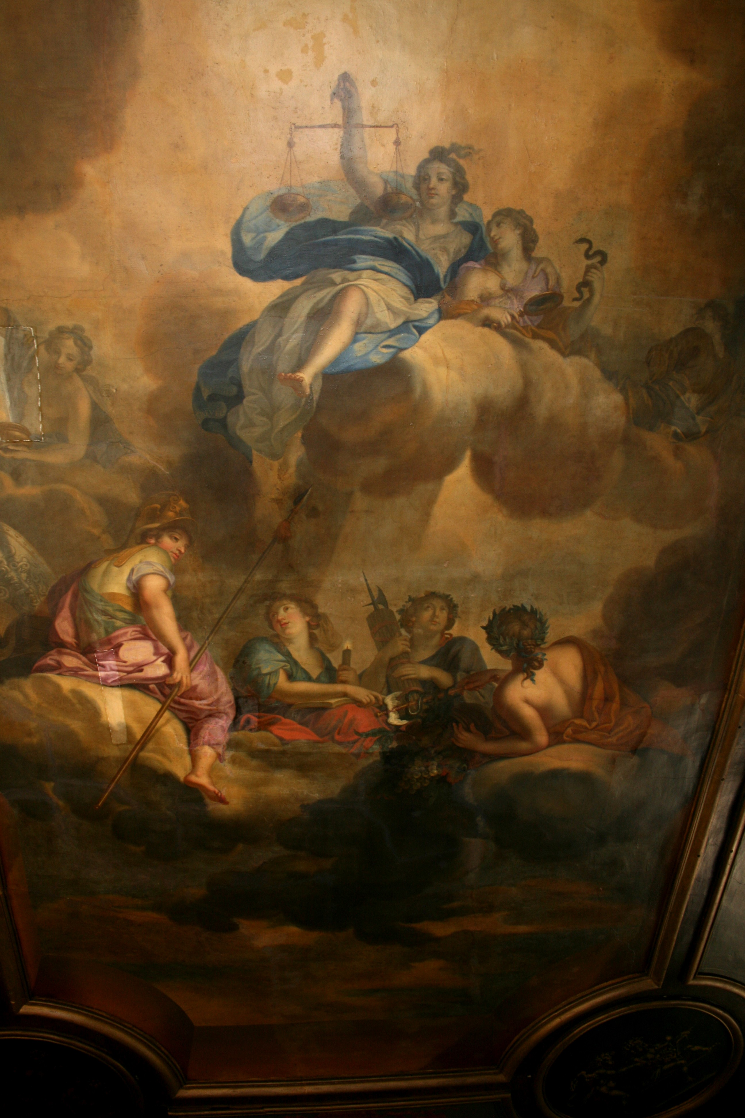 Plafond Bibliothèque Parlement Dijon